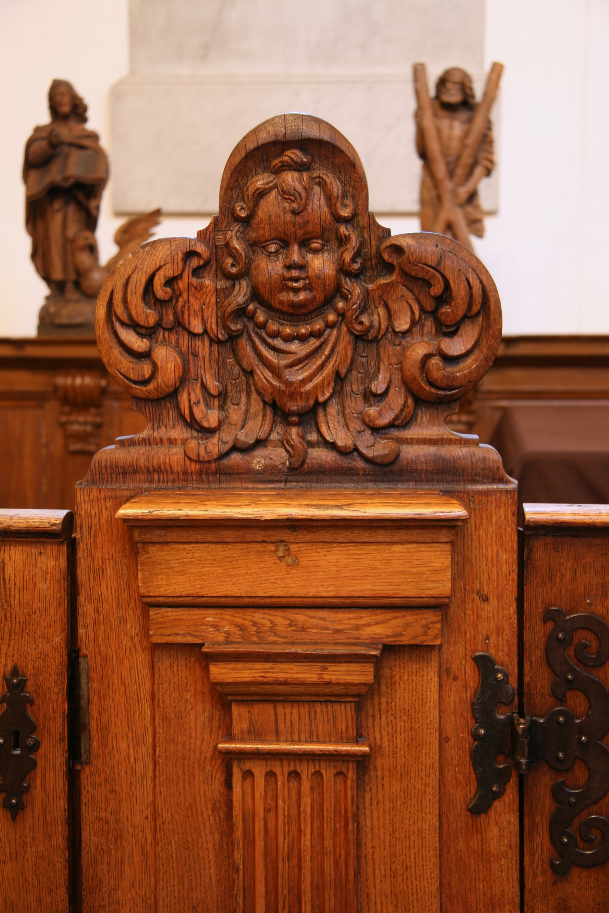 Holmens Kirke, Copenhagen, Denmark . Stolegavl.